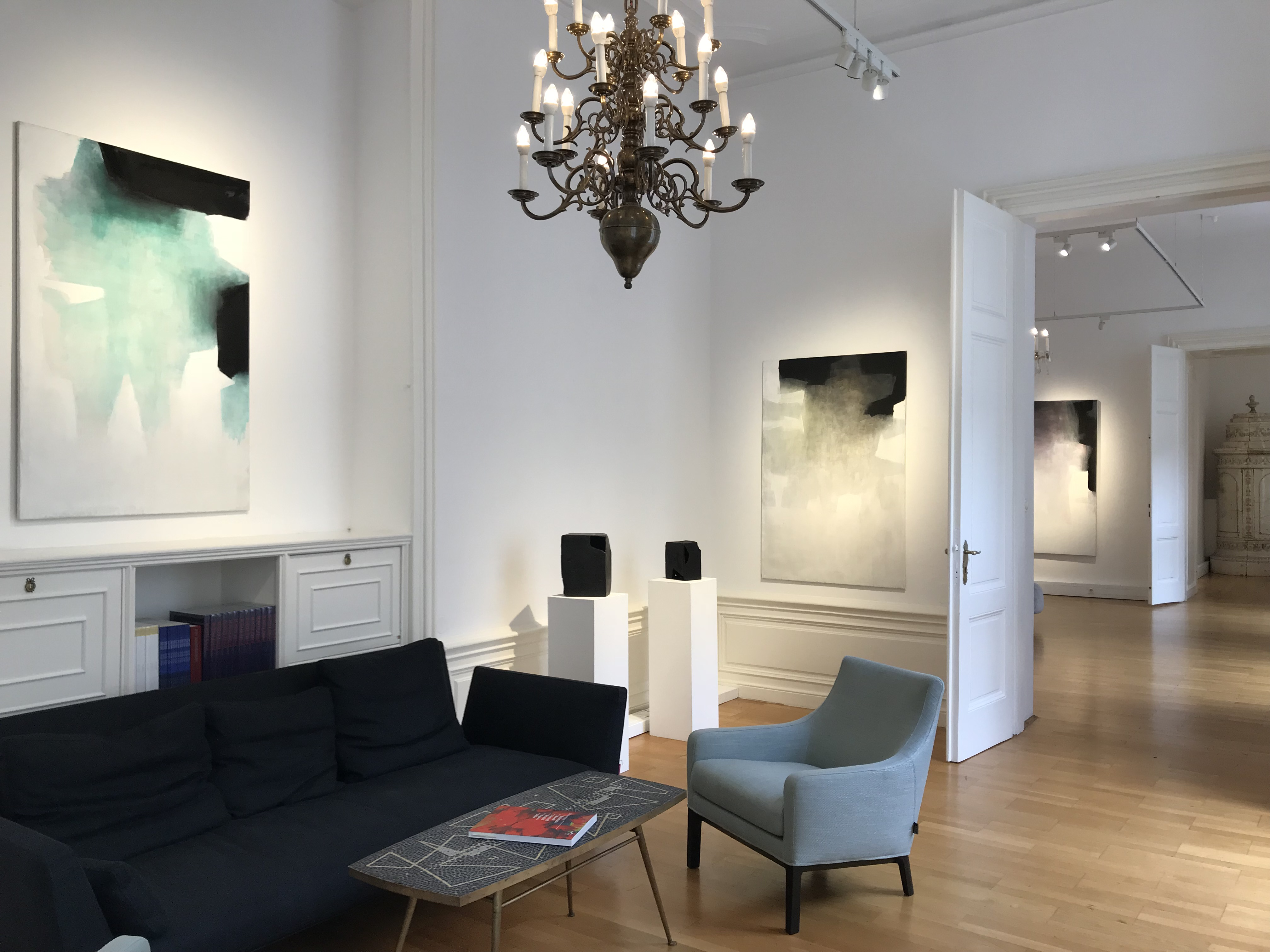 Ausstellungsansicht mit Gemälden und Skulpturen des Künstlers Walter Vopava, präsentiert von Kunsthandel W&K - Wienerroither und Kohlbacher in Wien 2018